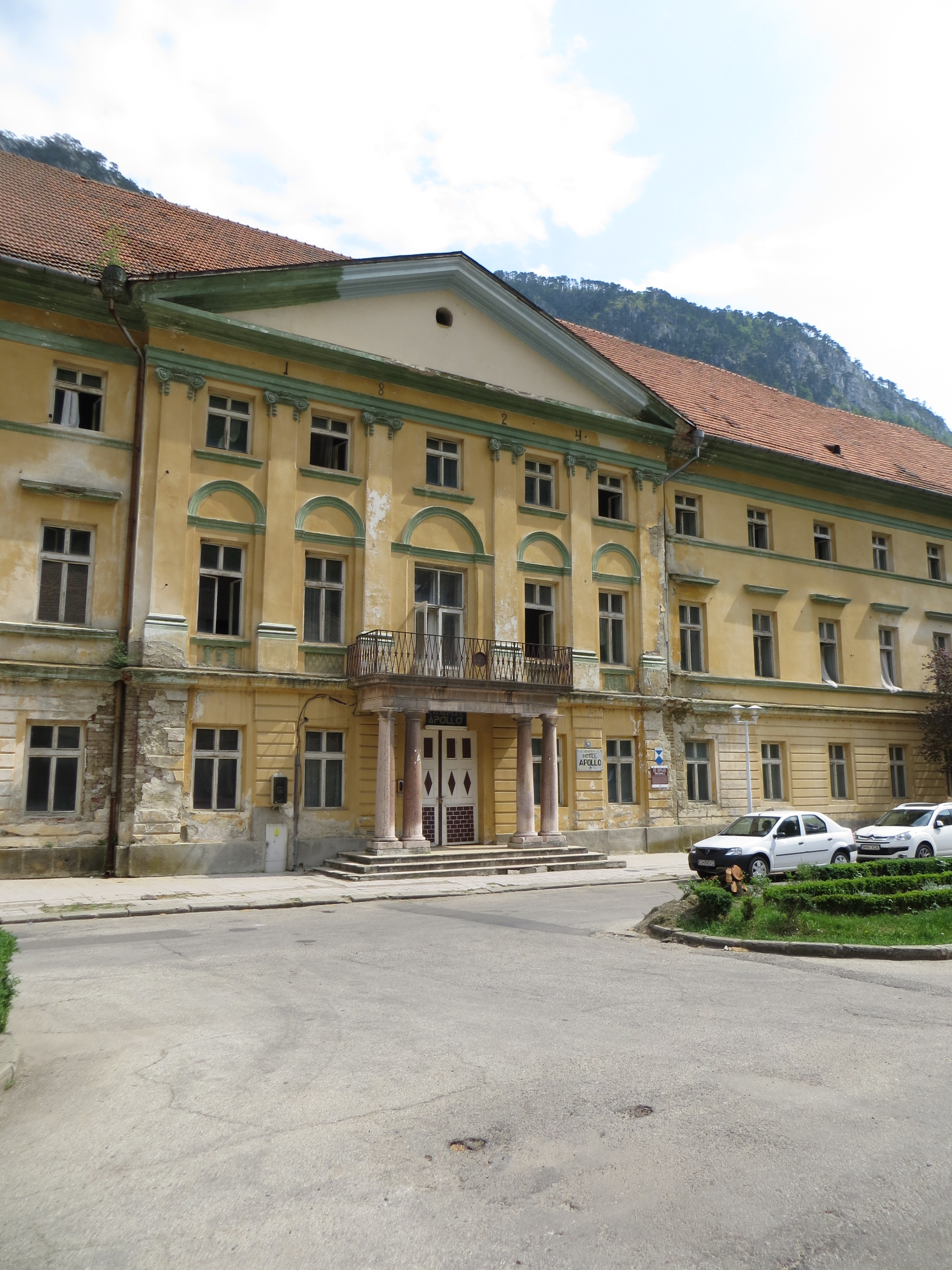 Pavilionul 3, azi parte a Hotelului "Apollo" 03